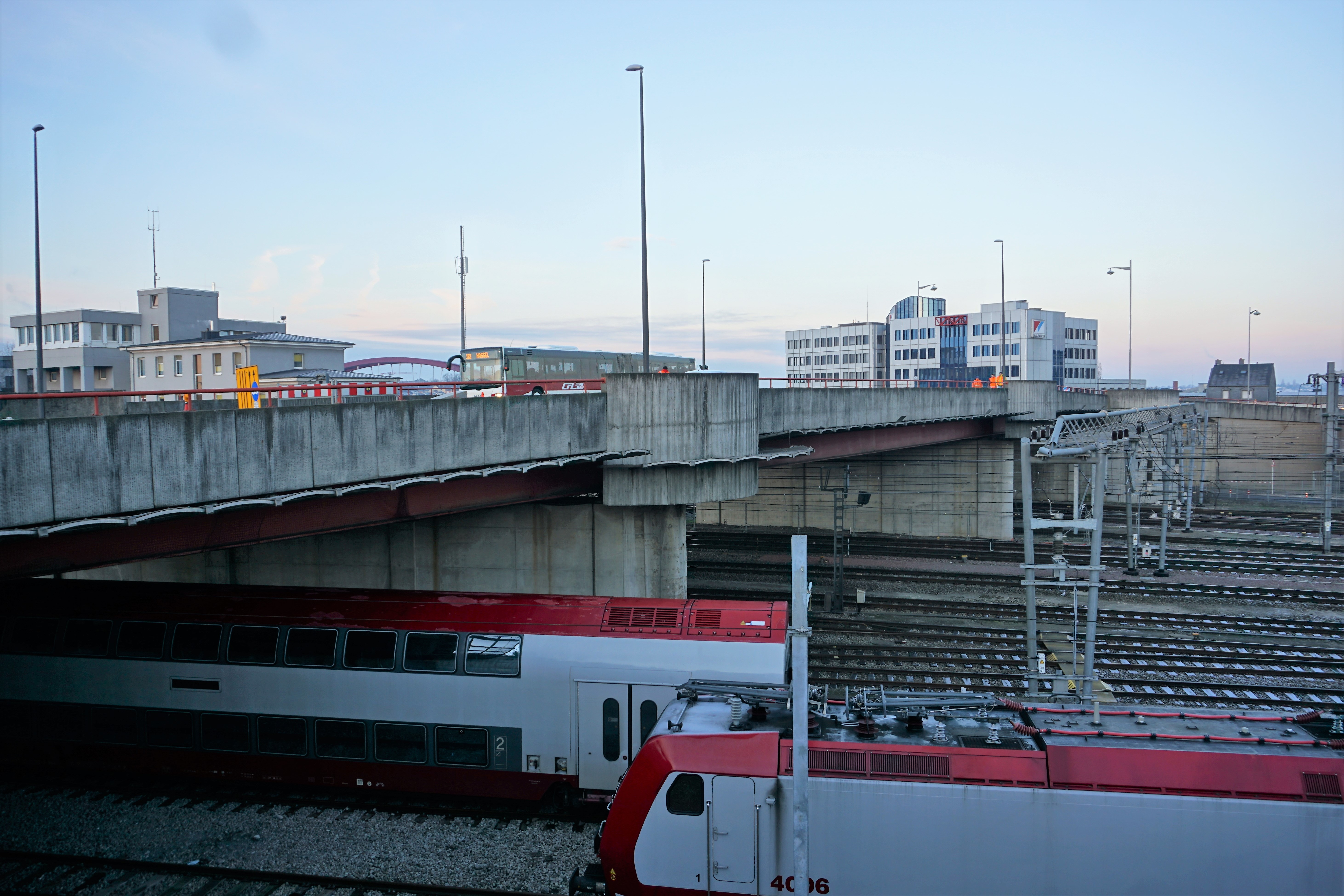 Luxembourg, pont Jean-Pierre-Büchler, vue depuis la rue d'Alsace en direction est.